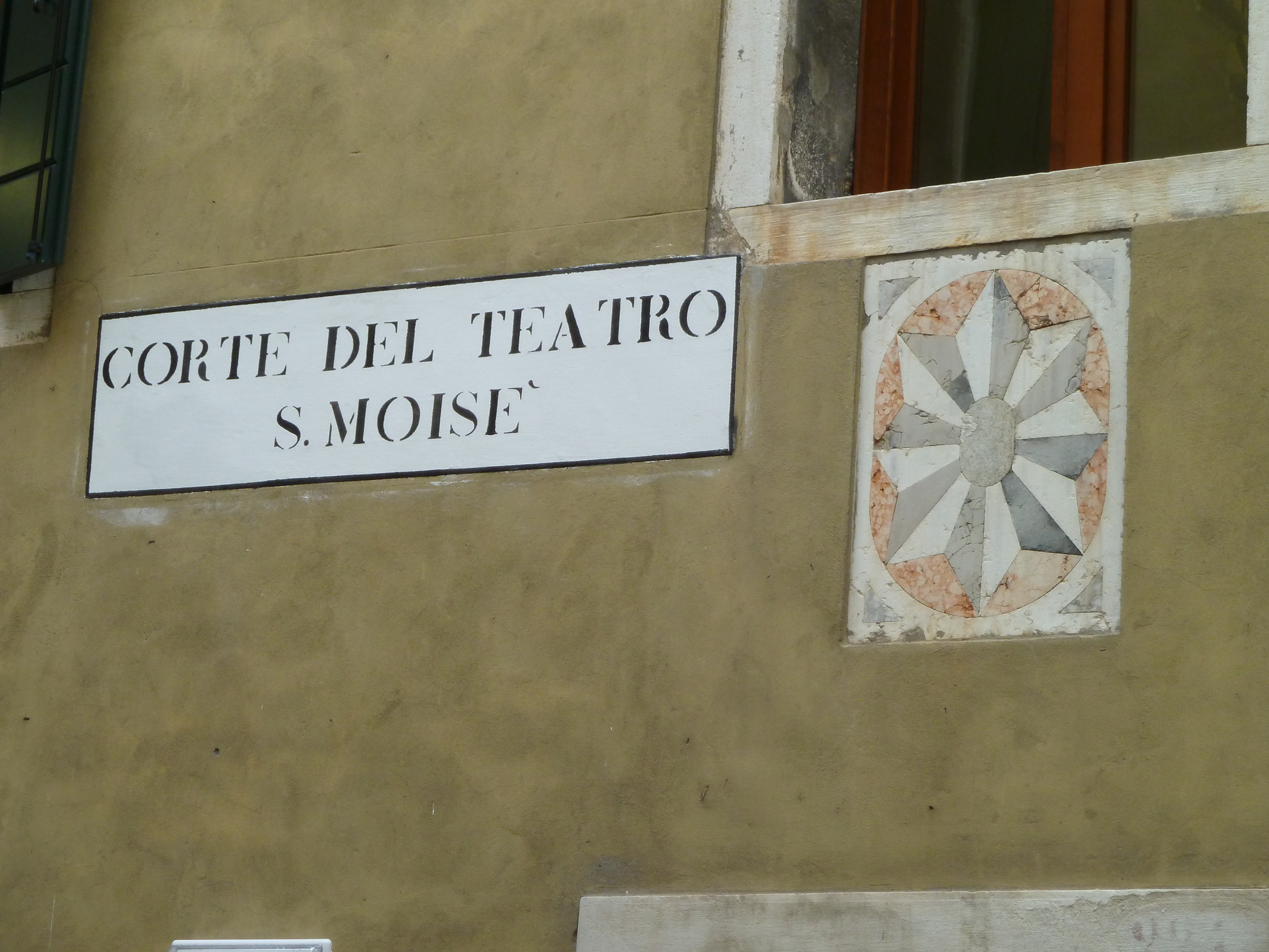 Corte del teatro s moise a s marco venezia